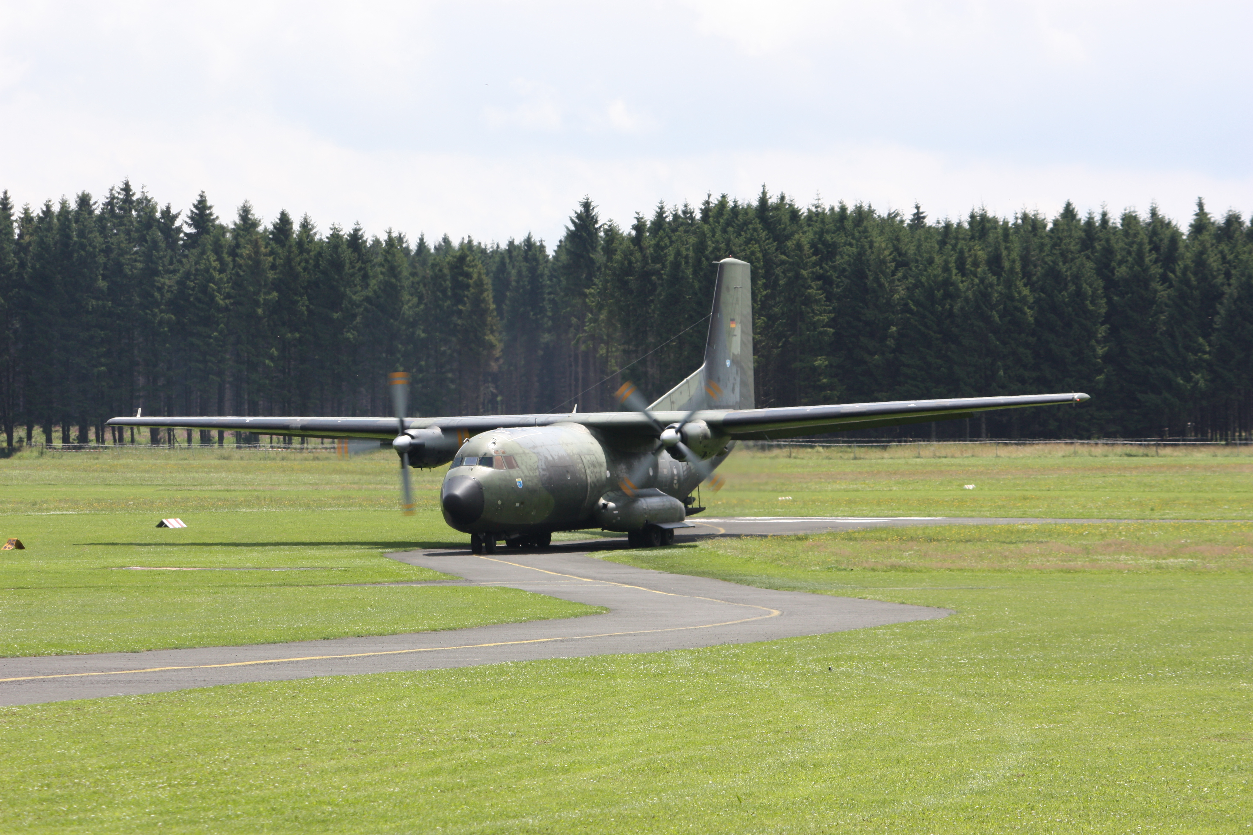 Transall auf dem Flughafen Breitscheid, Eigenes Foto